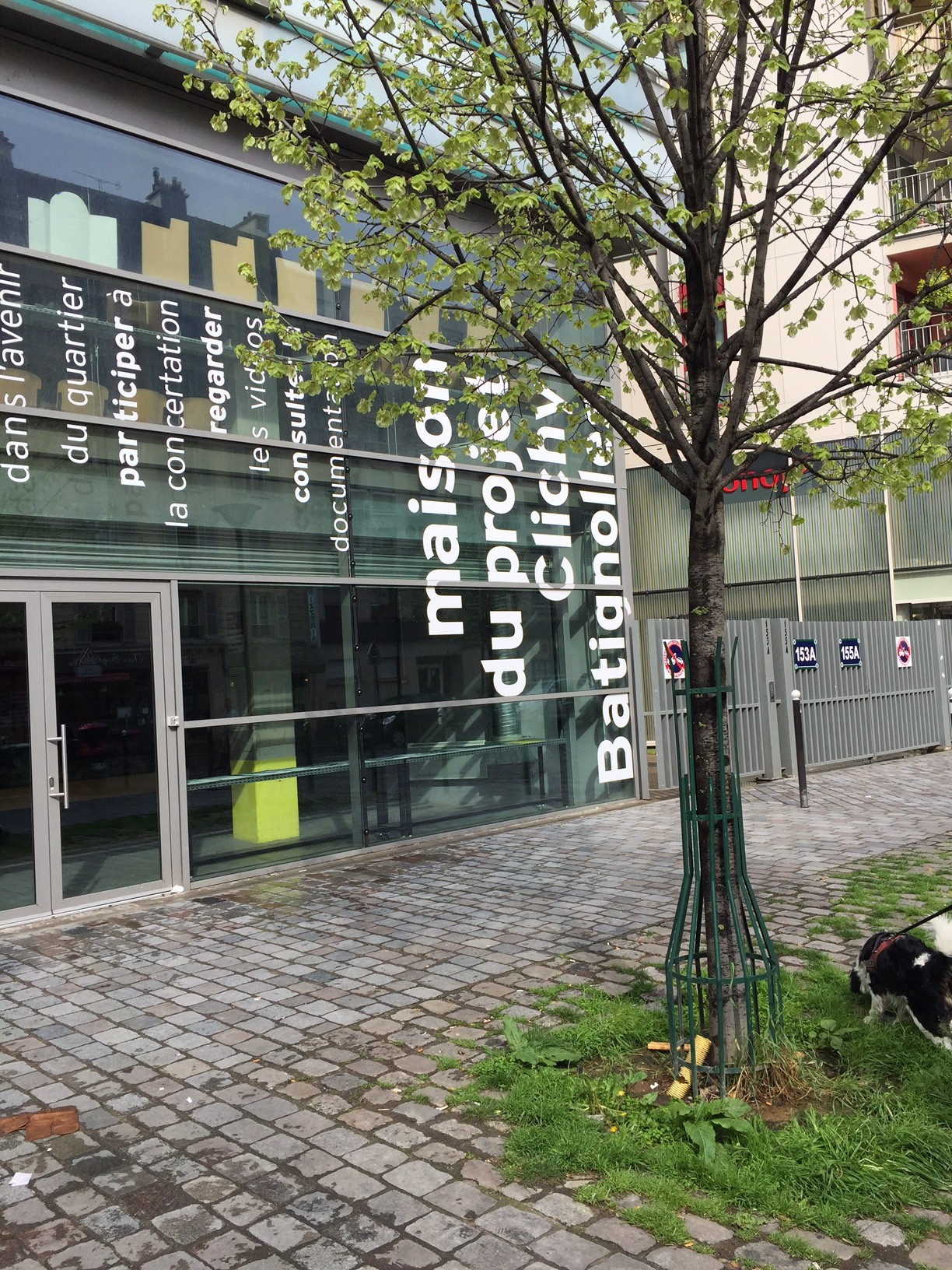 Photographie de la façade de la Maison du projet de l'écoquartier Clichy-Batignolles